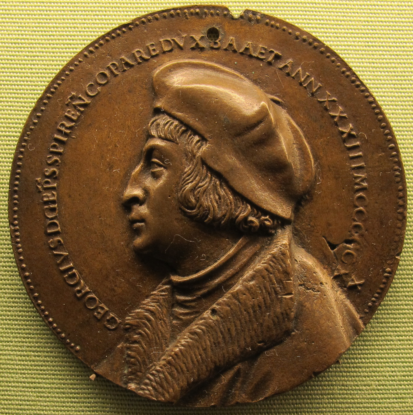 Conte palatino georg, vescovo di spira, 1520